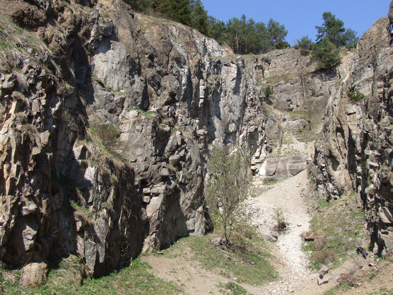 Dawny kamieniołom na górze Wdżar w Gorcach